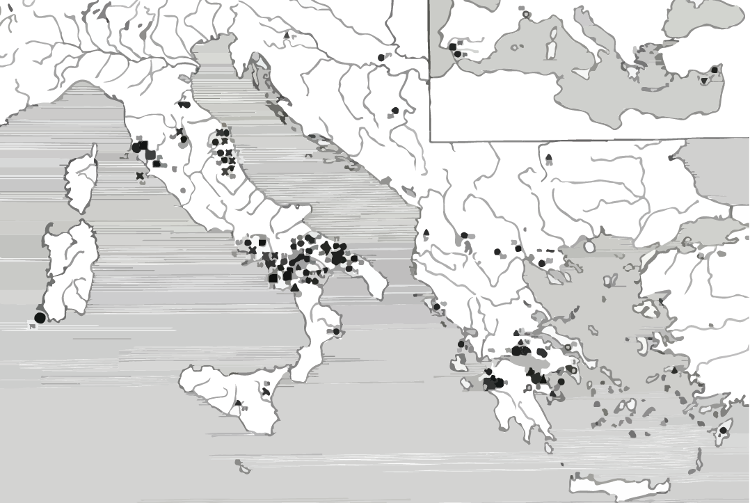 Carte de répartition schématique des casques corinthiens en Méditerranée antique